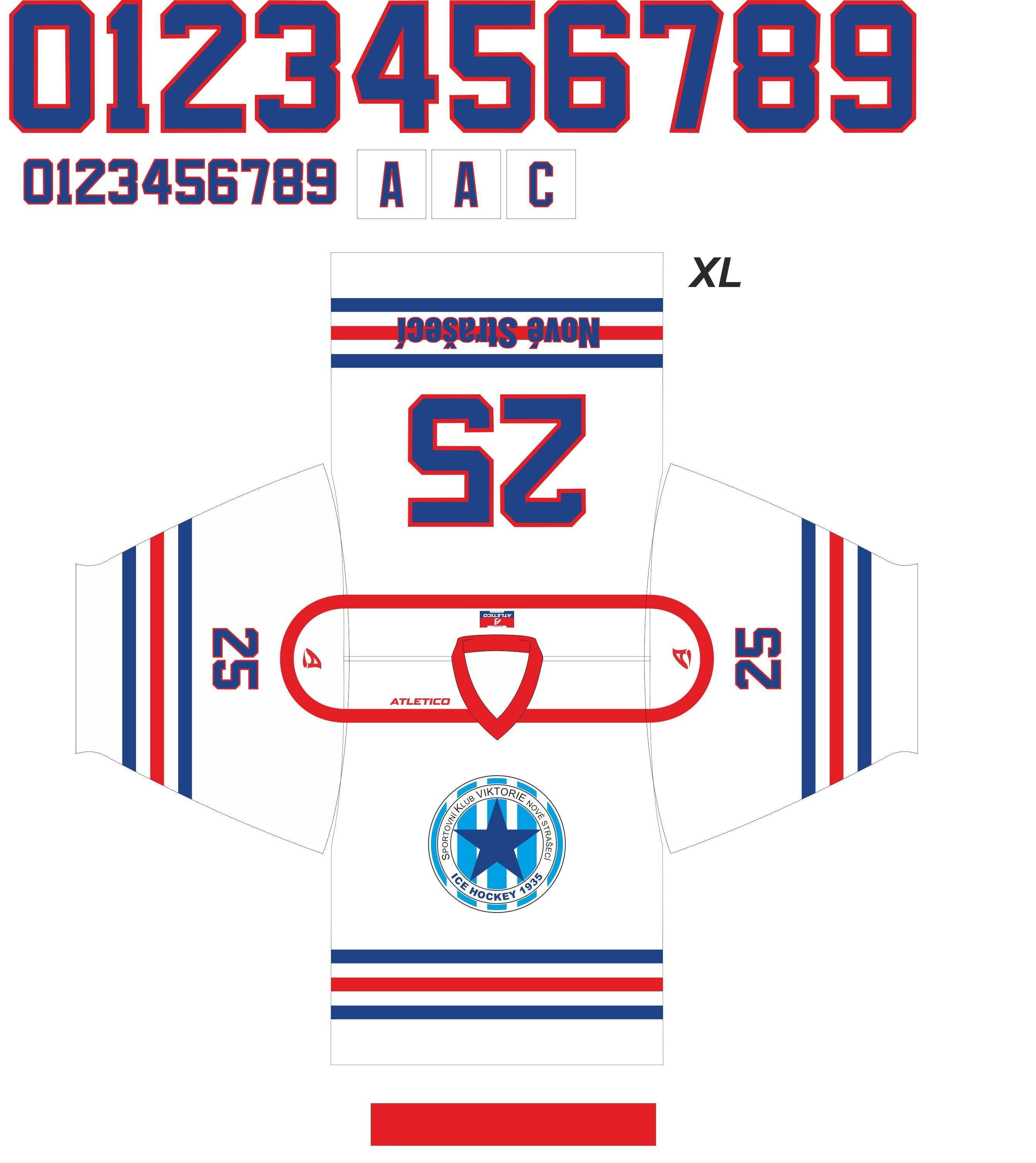 bílý hokejový dres